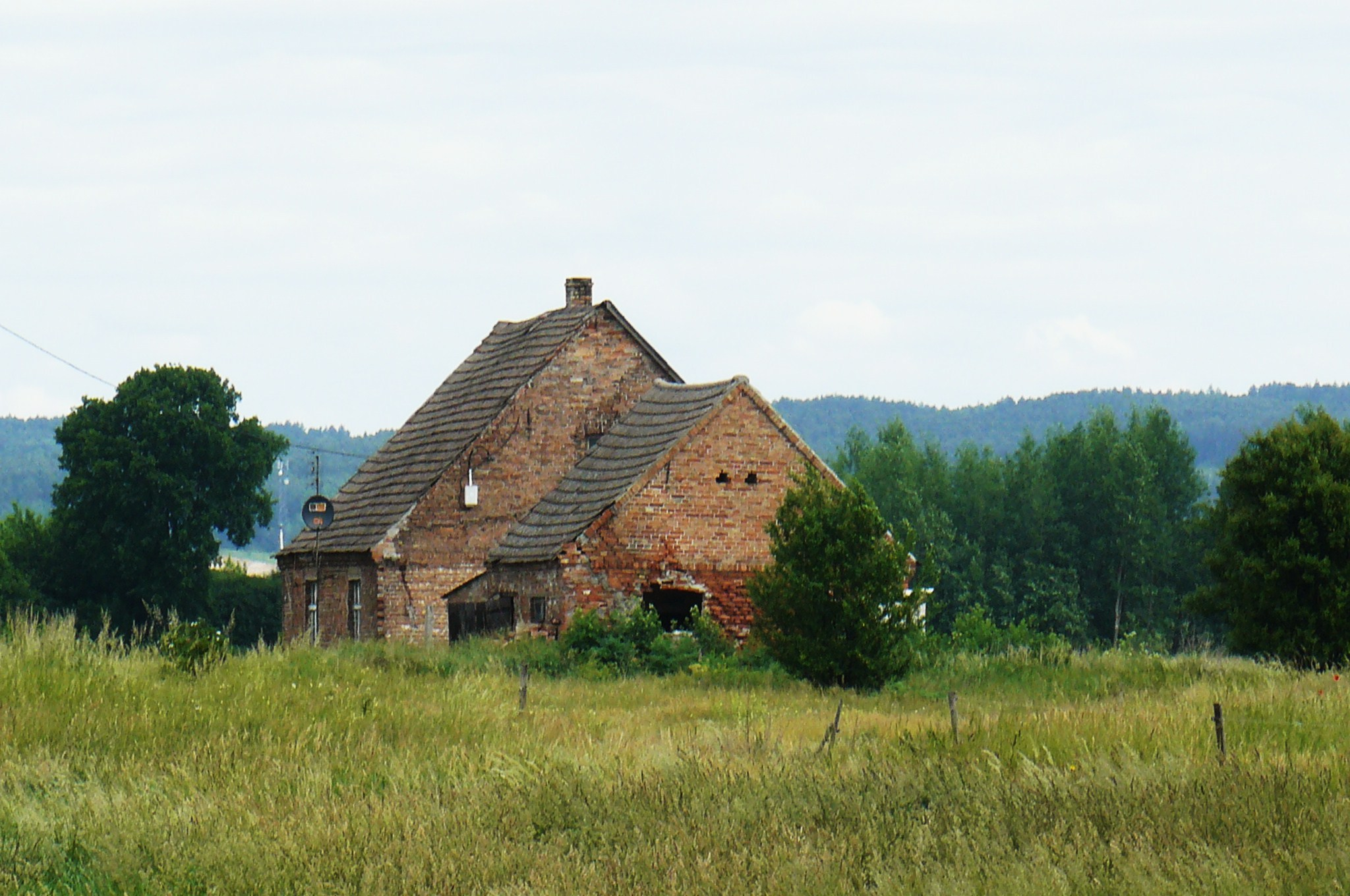 Pławin nad Notecią.